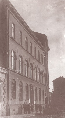 Тернопіль семінарія (Towarzystwo Szkoły Ludowej)